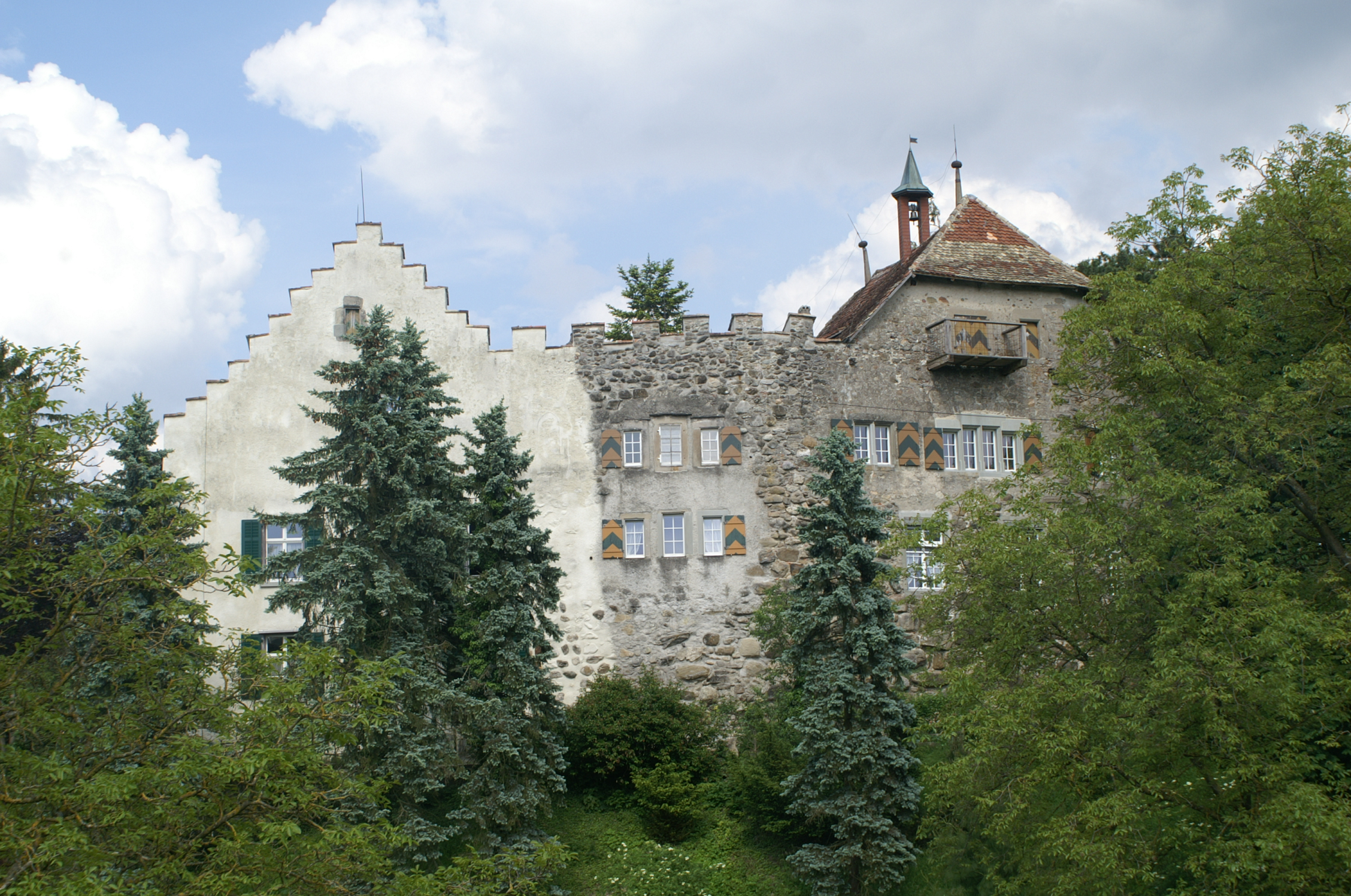 West-Fassade